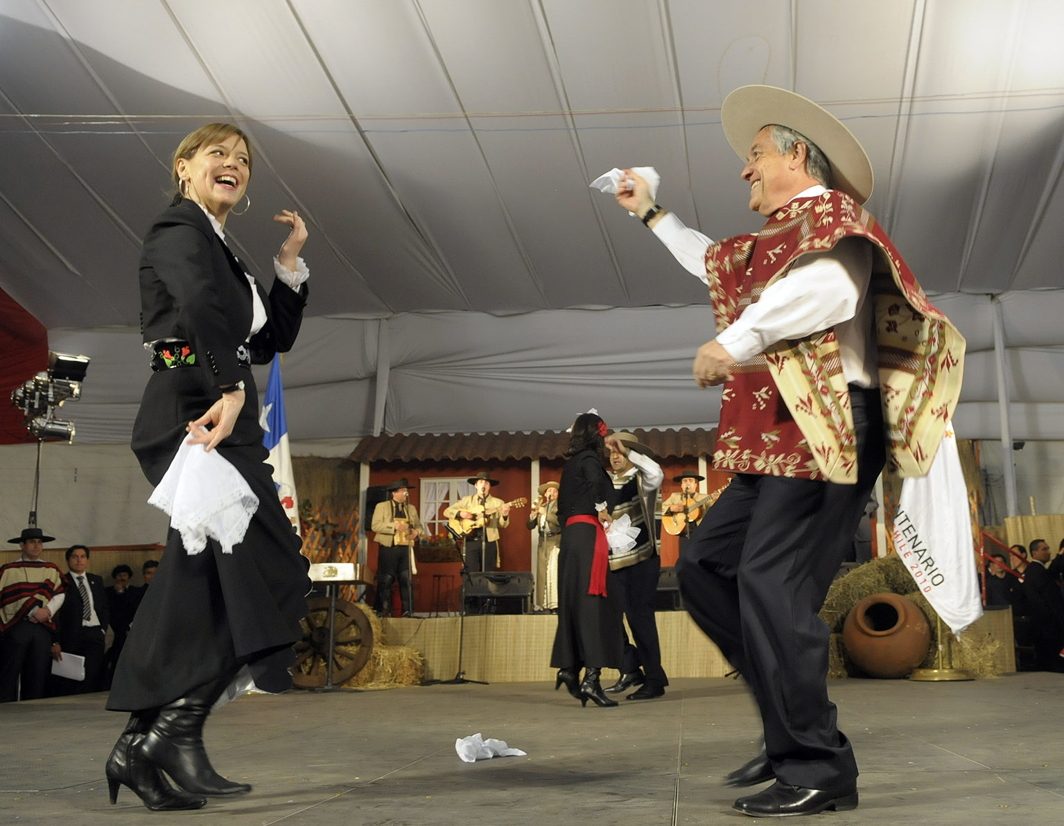 Con un pie de cueca junto a la ministra Secretaria General de Gobierno, Ena von Baer, el Presidente de la República, Sebastián Piñera, dio el puntapié inicial a las celebraciones de Fiestas Patrias en la fonda “Iorana” del Parque O’Higgins. Acompañado por su esposa, Cecilia Morel, ministros de Estado, parlamentarios y el alcalde de la comuna de Santiago, Pablo Zalaquette, el Mandatario cortó la cinta de inauguración, efectuó un brindis en cacho de chicha y también realizó una paya dieciochera. Además, aprovechó la ocasión para hacer un llamado de unión en esta fecha tan importante para el país. “Hay cosas que nos separan, por supuesto que sí, pero es mucho más fuerte lo que nos une. Hacer una fiesta alegre, una fiesta de familia, una fiesta de futuro, una fiesta que nos dé la fuerza para enfrentar la maravillosa aventura del futuro”, expresó.